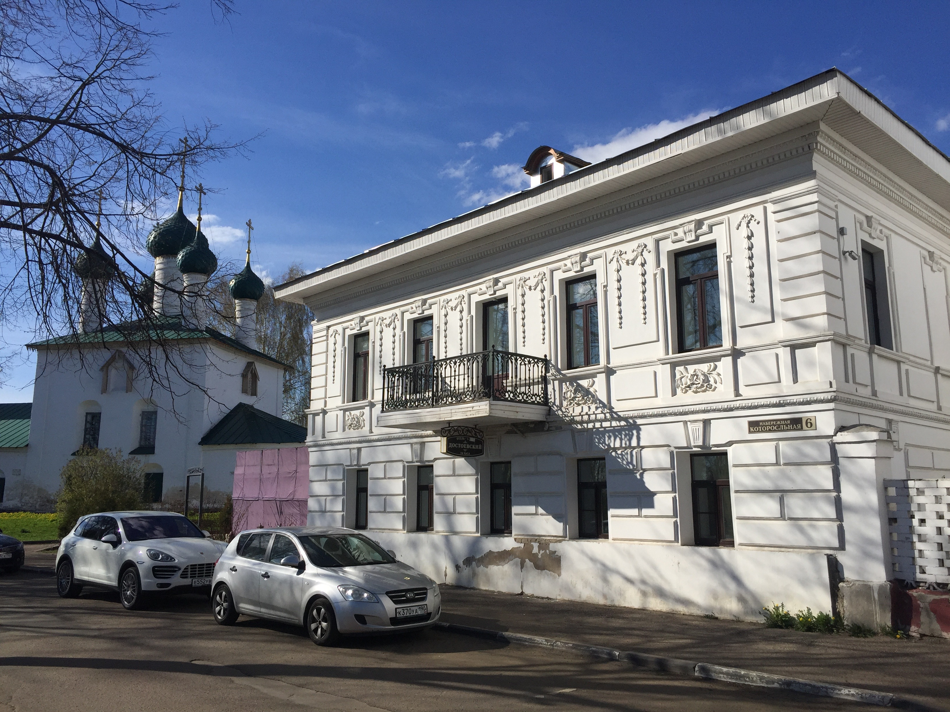 Центр города